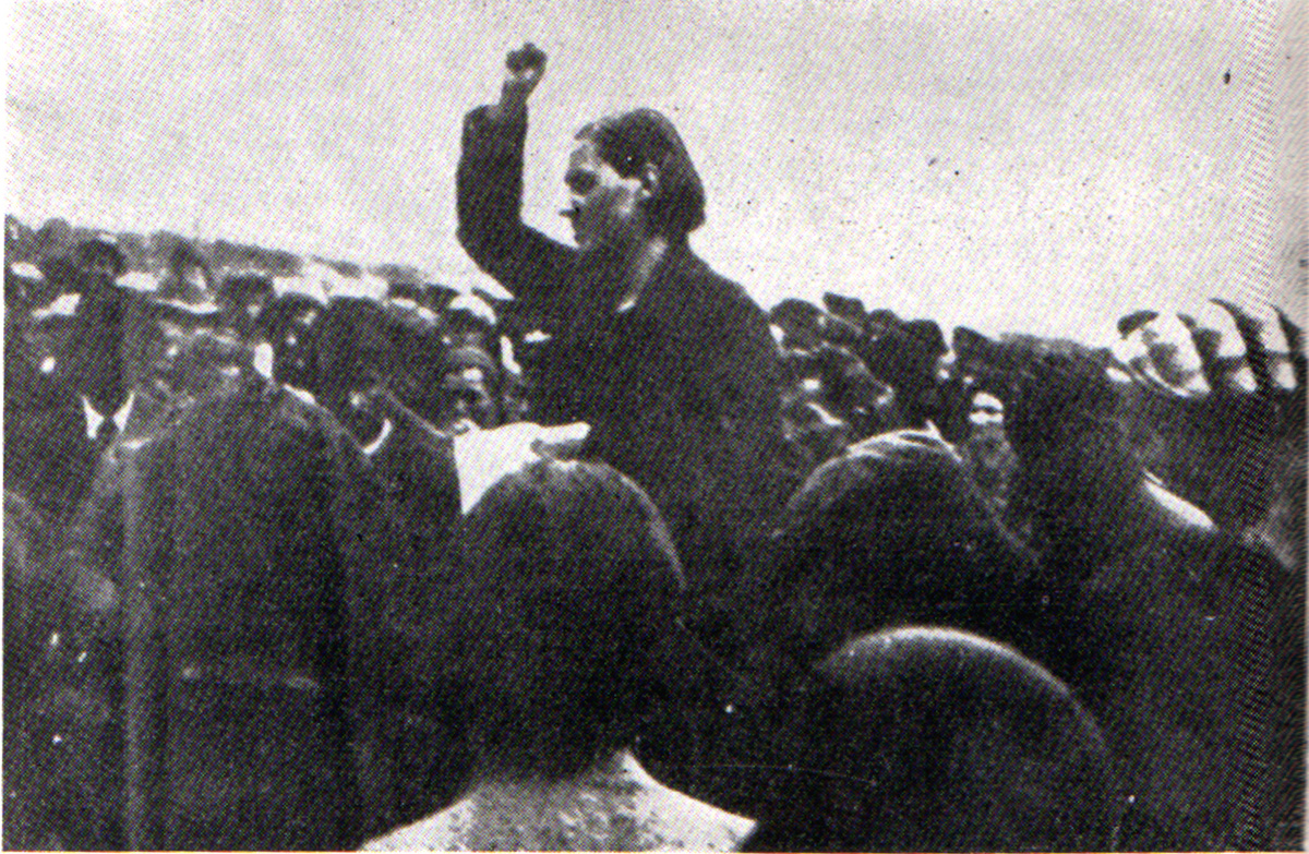 Srpskohrvatski / српскохрватски: Jelena Ćetković govori na sahrani ubijene drugarice Božane Vučinić 1937. godine.